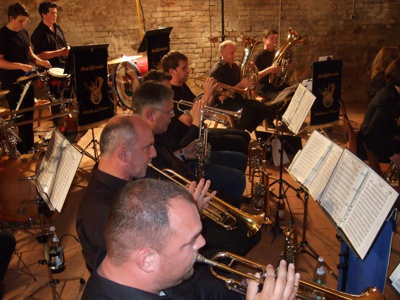 Stadtkapelle Wörth Donau live in Concert